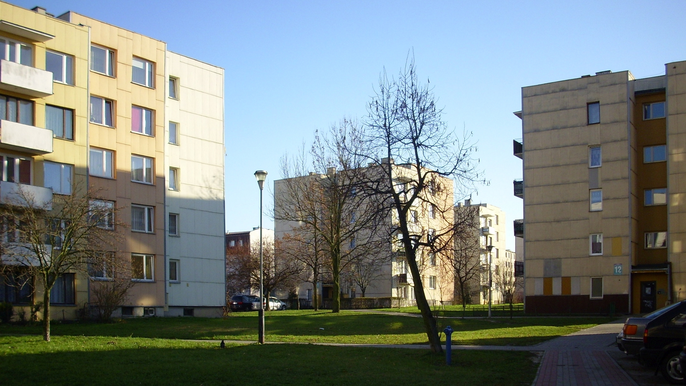 Łuków (woj. lubelskie, Polska). Osiedle mieszkaniowe przy ul. Unitów Podlaskich.